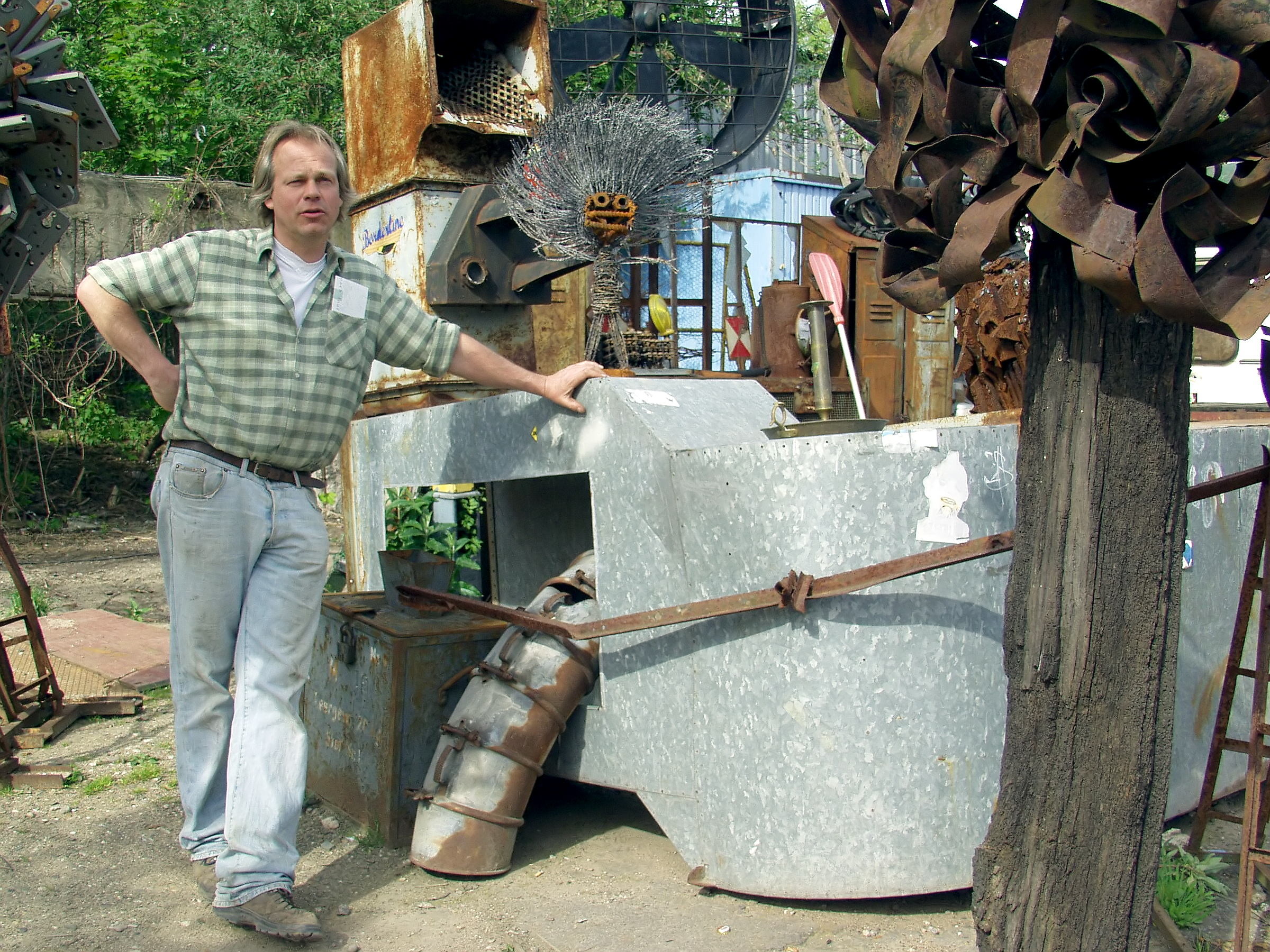 Odo Rumpf auf seinem Ateliergelände